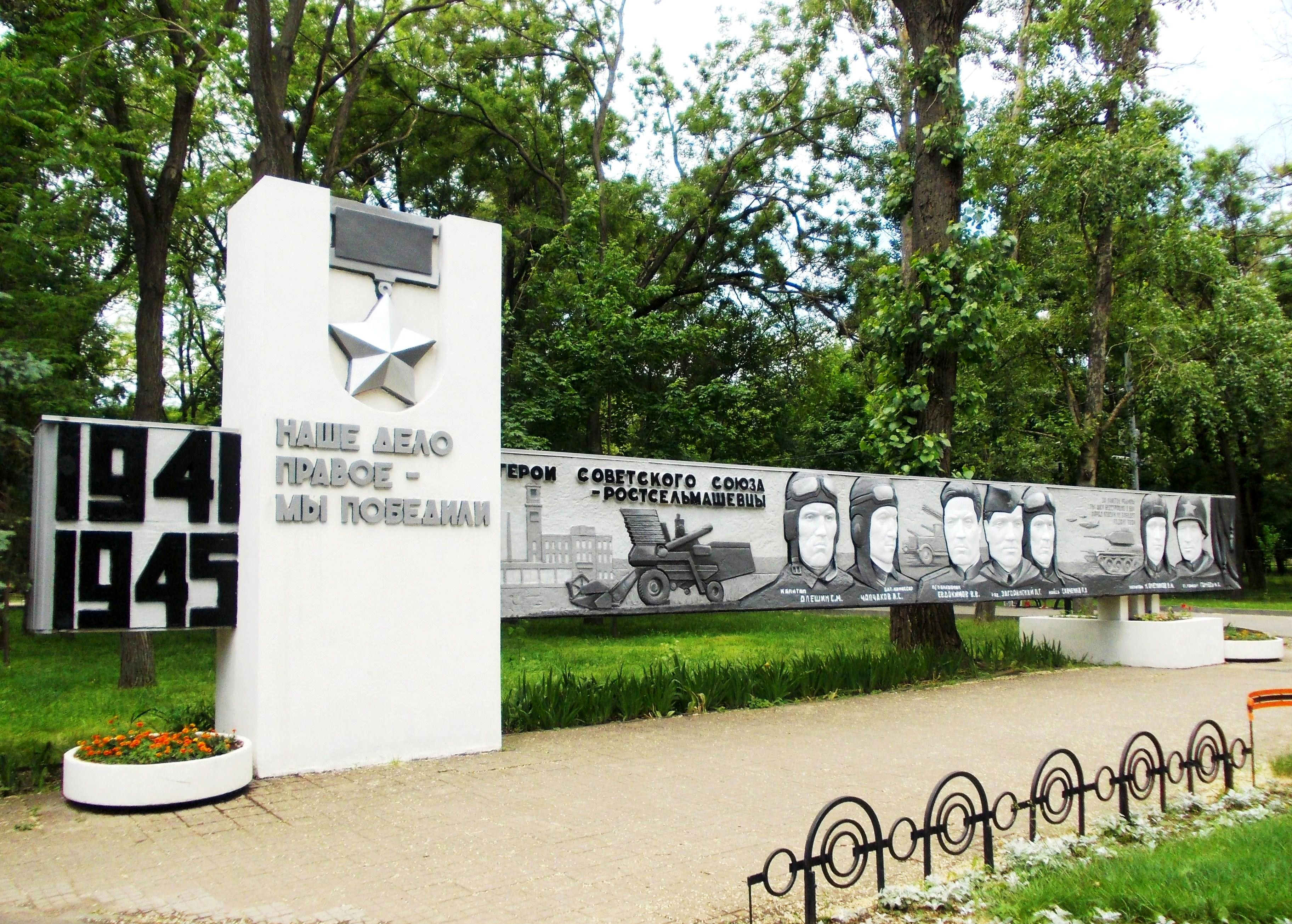 Во время Великой Отечественной войны 2500 рабочих и служащих завода Ростсельмаш ушли на борьбу с фашистами в действующую армию и народное ополчение. Свыше трехсот комбайностроителей за ратные подвиги были награждены орденами и медалями, тринадцать рабочих завода Ростсельмаш удостоены звания Героя Советского Союза. В ознаменование этих славных подвигов рабочих завода Ростсельмаш, в парке им. Н. Островского была установлена Стела Героев. Инициаторами ее создания стали в 1973 году трудящиеся завода. В основе архитектурной композиции - две пересекающиеся стелы. На большой горизонтальной стеле, выполненной из бетона, - цифры «1941 -1945» и барельефы ростсельмашевцев - Героев Советского Союза, павших на полях сражений Великой Отечественной войны: С.М. Алешина М.А. Гаккеля В.В. Евдокимова А.Г. Загоринского В.М. Колесникова П.П. Савченко Л.С. Чапчахова Здесь же высечены слова: ЗА СЧАСТЬЕ РОДИНЫ ТЫ ШЕЛ БЕССТРАШНО В БОЙ, НАРОД ВОВЕКИ НЕ ЗАБУДЕТ ПОДВИГ ТВОЙ. На вертикальной стеле в верхней ее части высечены медаль «Золотая Звезда» и текст: «Наше дело правое - мы победили». И сегодня к монументу часто возлагаются венки, а память об этих подвигах бережно хранится.